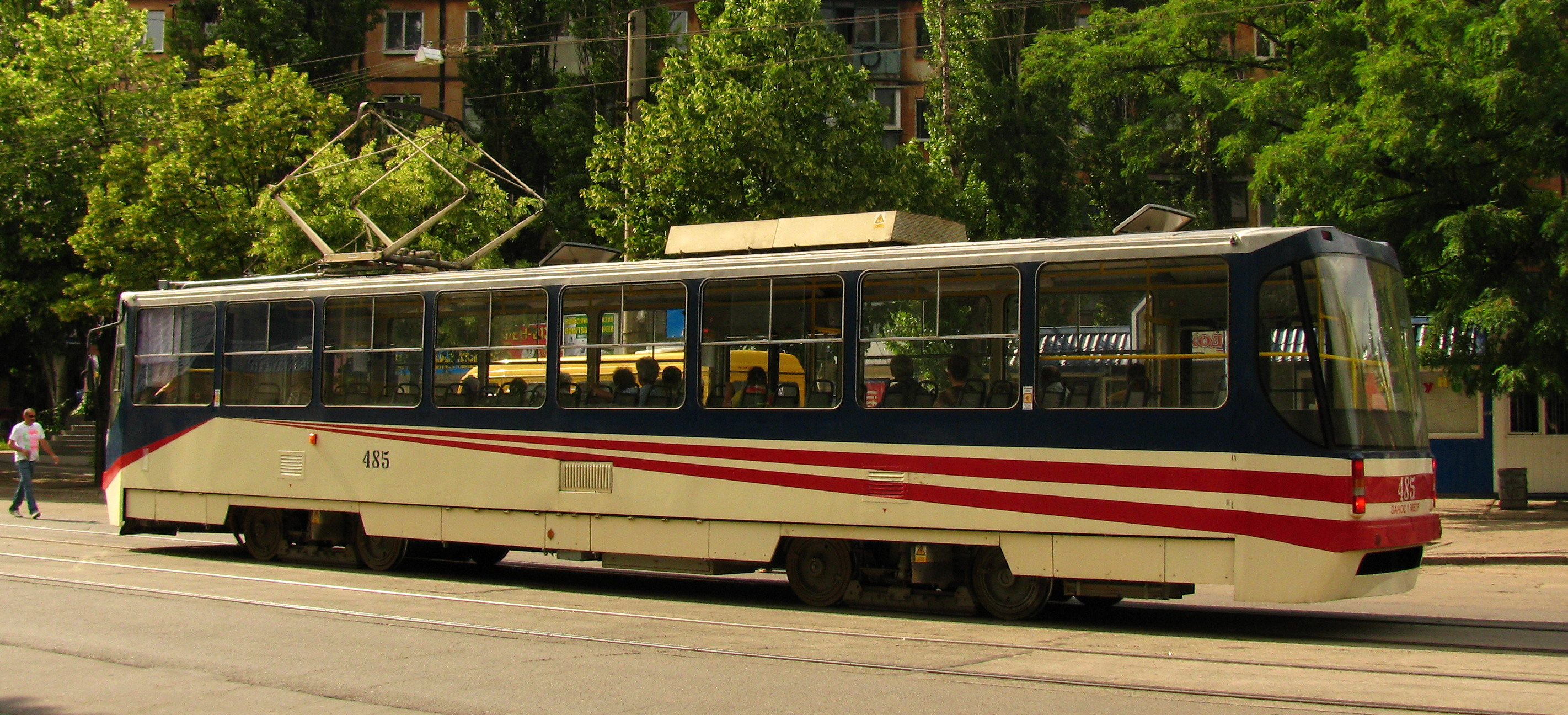 трамвайний вагон К-1 у Кривому Розі (вид збоку)